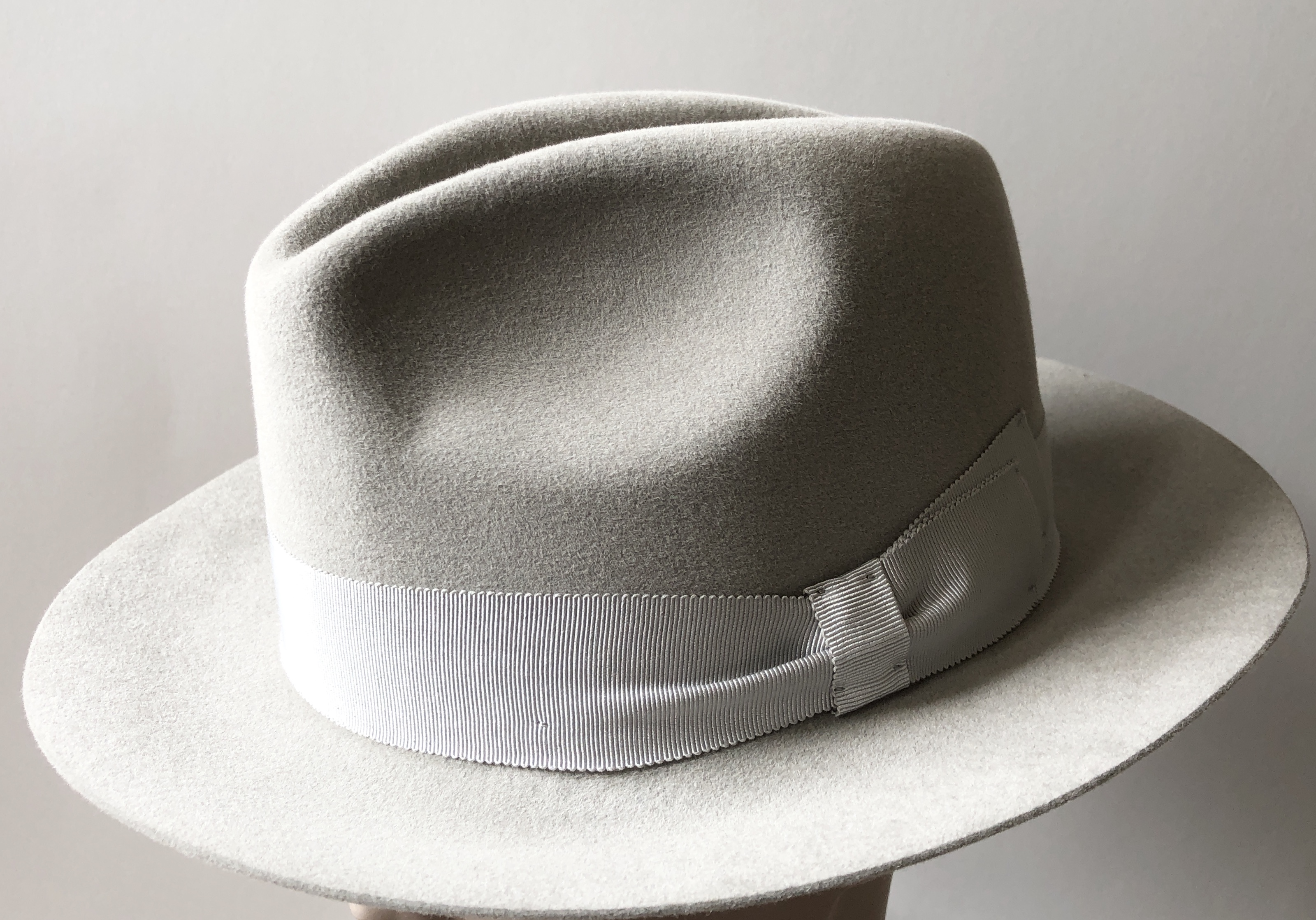 Kapelusz Dagmar POLKAP